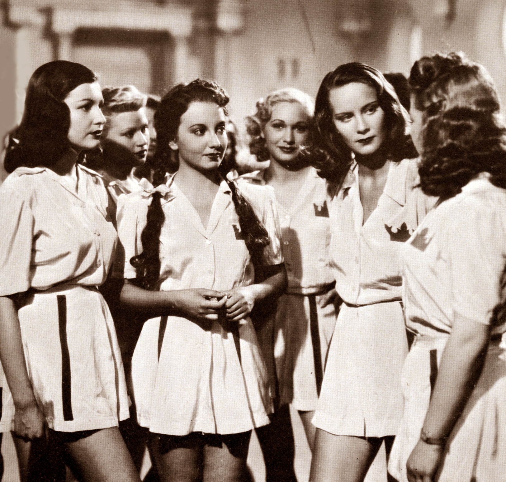 Una foto del set del film "Ore 9 lezione di chimica", 1940 Con Tatiana Farnese, Bianca Della Corte e Alida Valli